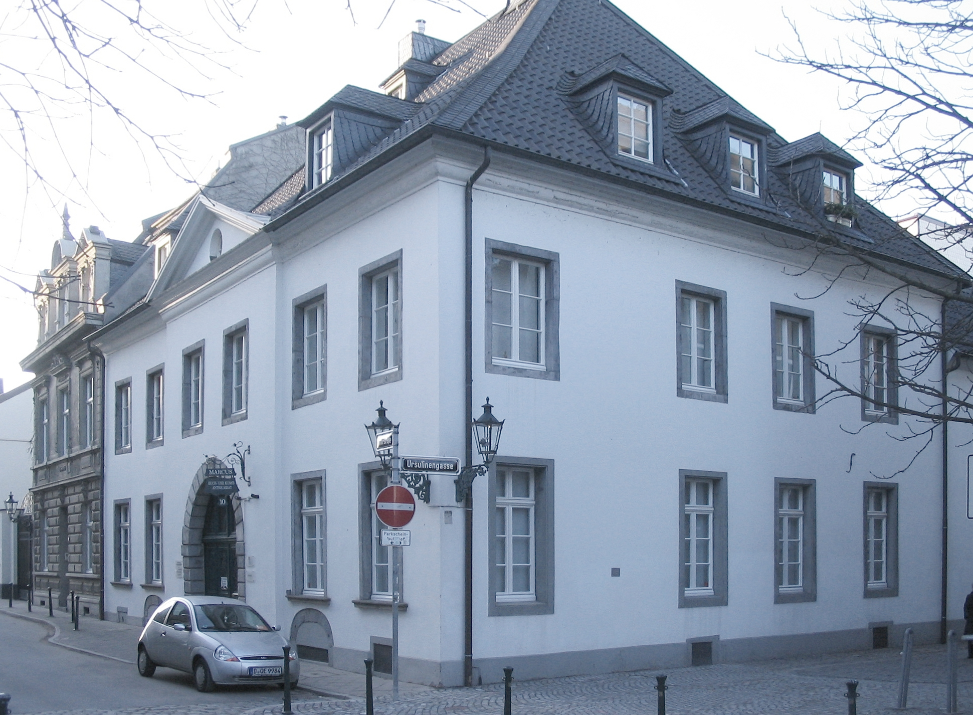 Düsseldorf, Ritterstraße 10 Ecke Ursulinengasse